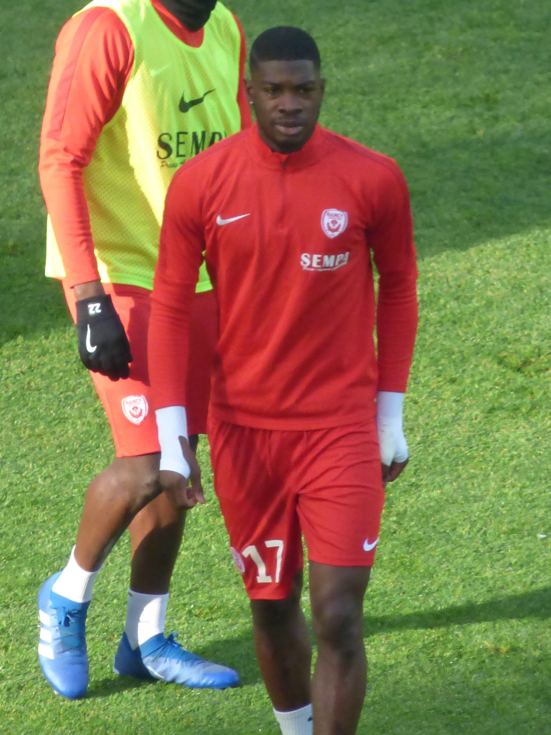 Malaly Dembélé avant le match RC Lens / AS Nancy-Lorraine, comptant pour la vingt-et-unième journée du championnat de France de football de Ligue 2 2018-2019, le 19 janvier 2019, au Stade Bollaert-Delelis de Lens.